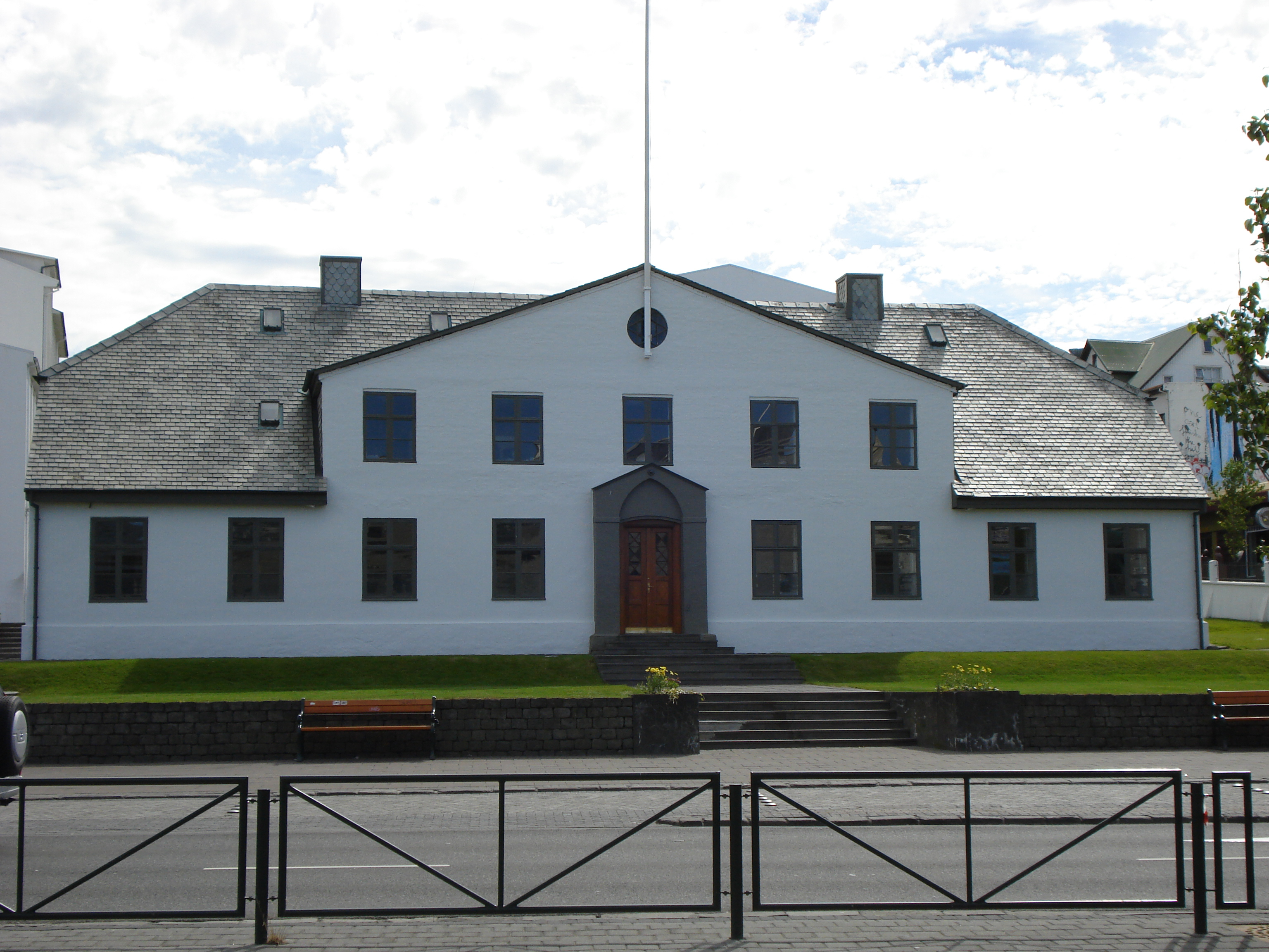 Stjórnarráðið, House og Government, Reykjavik, Iceland